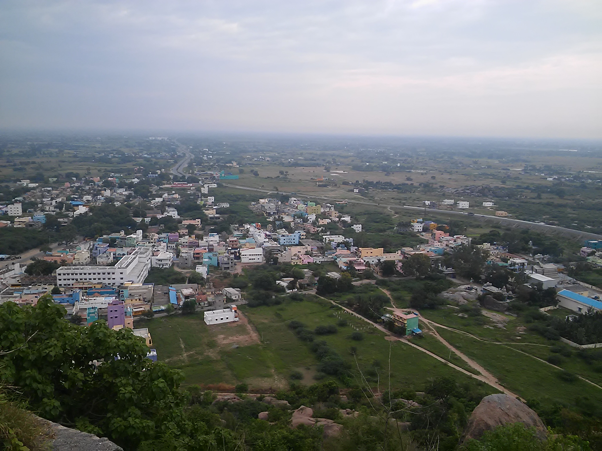 it is view of Thiyagadurgam town from Thiyagadurgam hill with 4 lane NH 79 in background